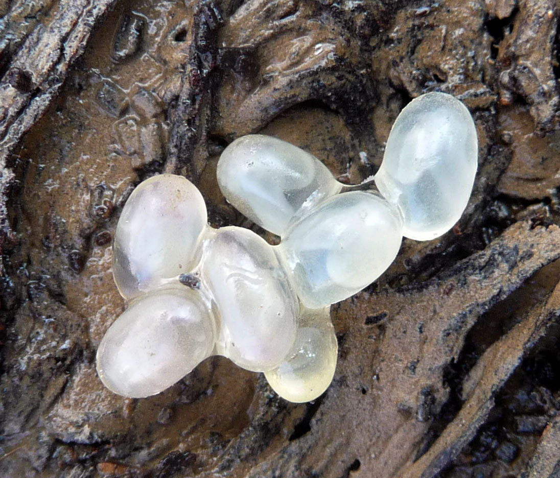 Earwig eggs?